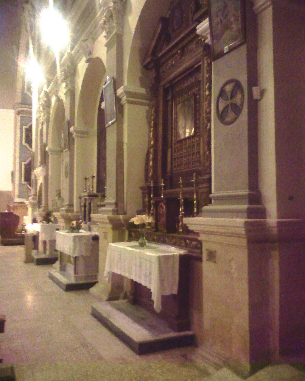 Chiesa Maria Santissima Annunziata - Modugno (Bari) - Italy